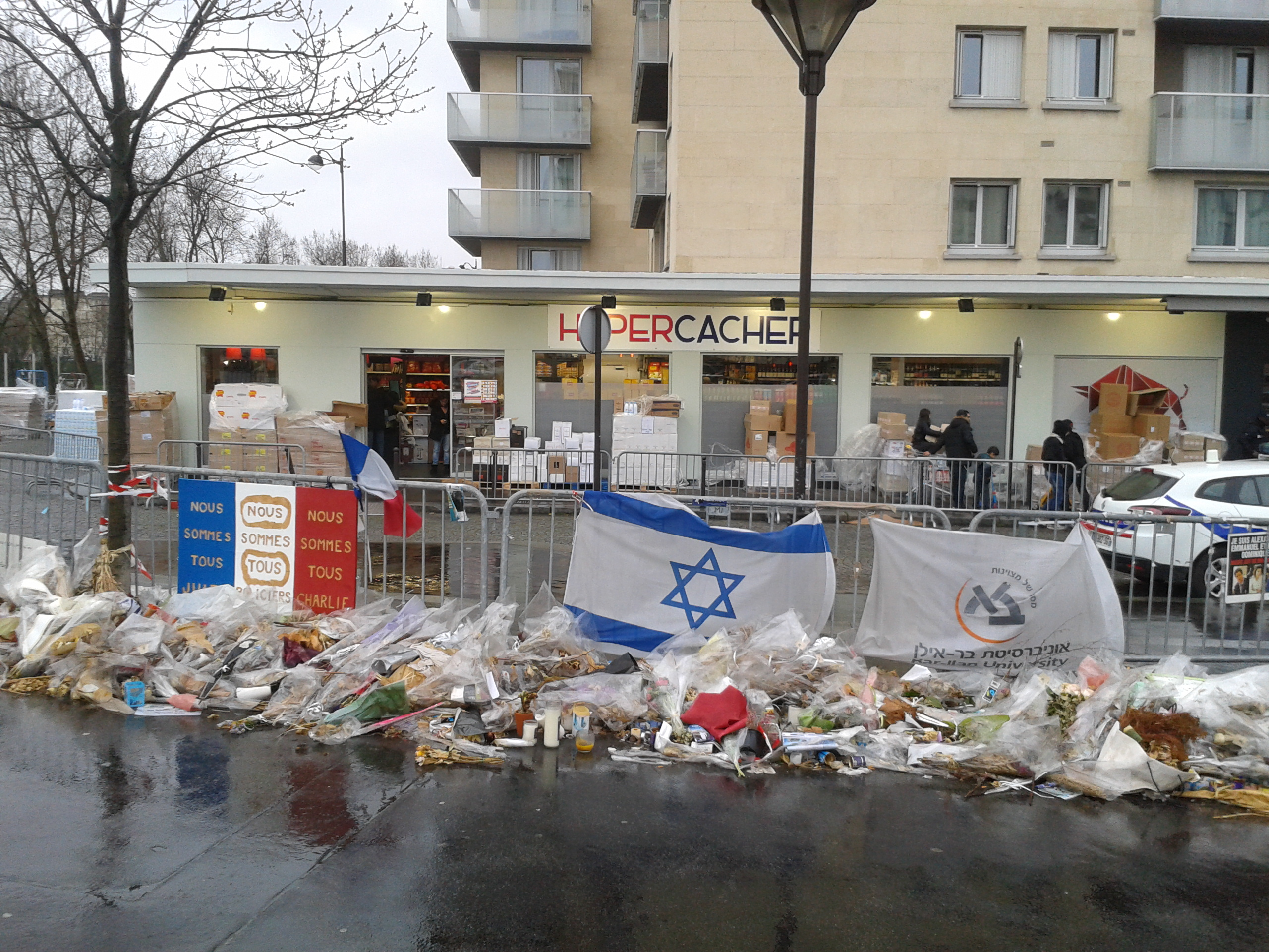 Le magasin "Hyper Cacher" porte de Vincennes, après réouverture